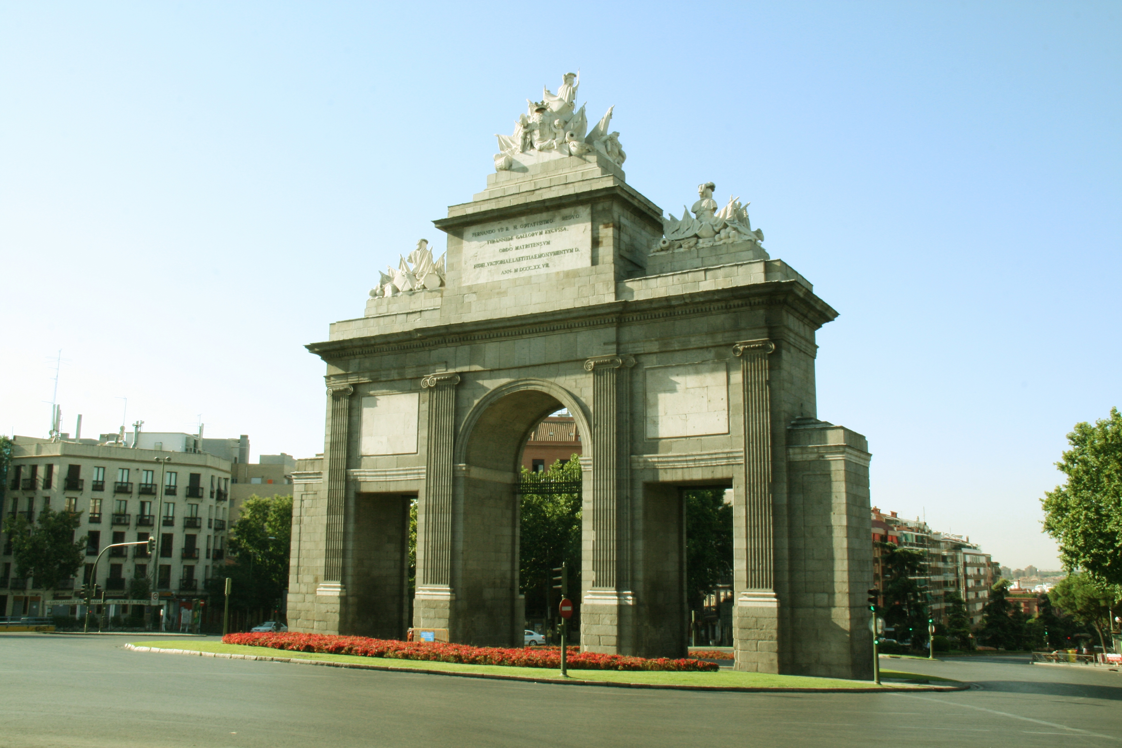 Puerta de Toledo Madrid